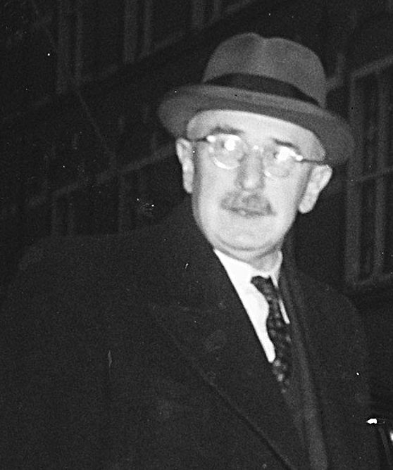 Original caption: "Benelux-conferentie in Den Haag van 10 t/m 12 maart 1949. De Luxemburgse delegatie. " — Nationaal Archief